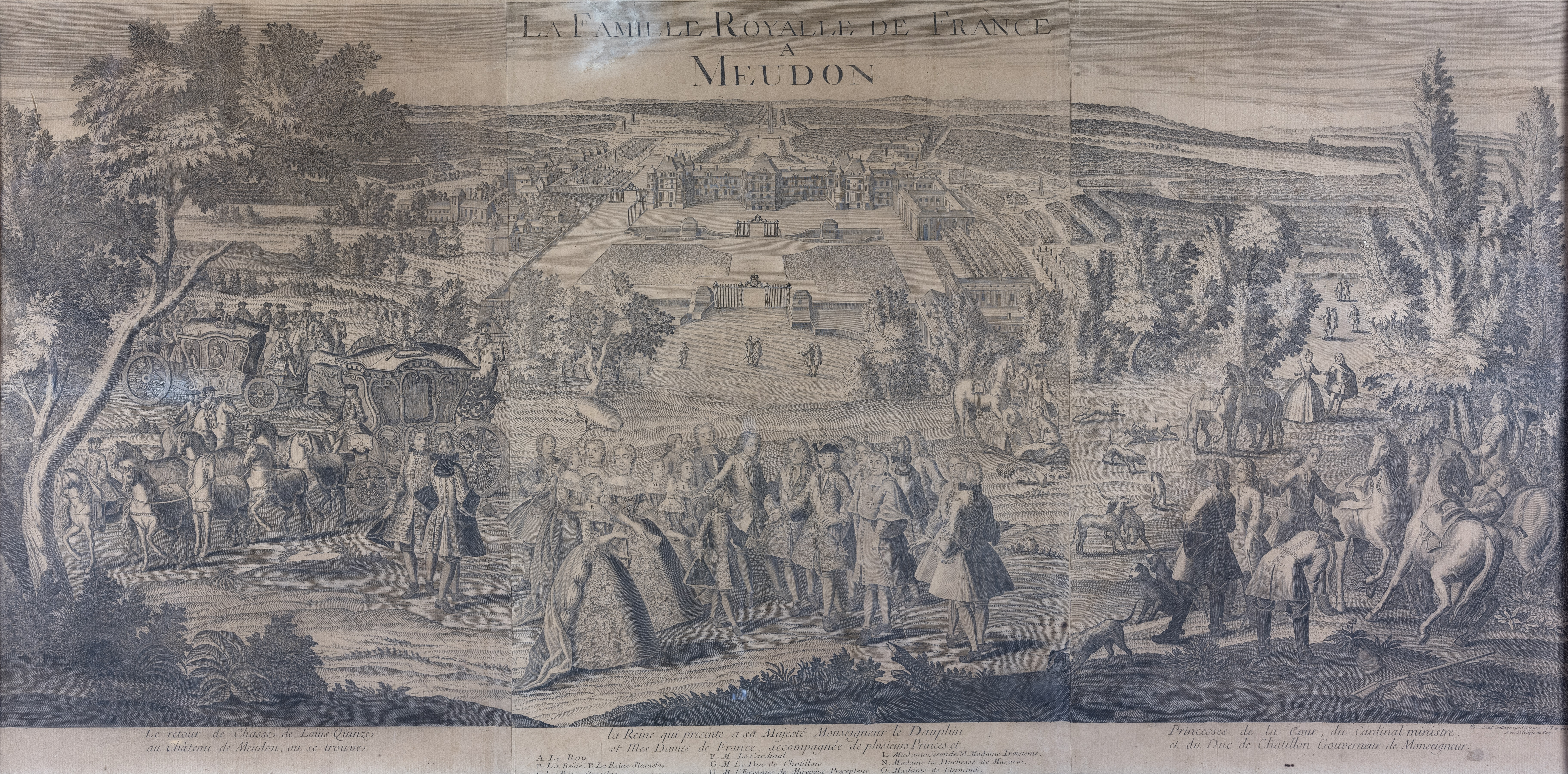 Le retour de chasse de Louis XV au château de Meudon. Vers 1736-1737. A la droite du roi se trouve le roi Stanislas, son beau-père, entourés de toute la famille de Sa Majesté.